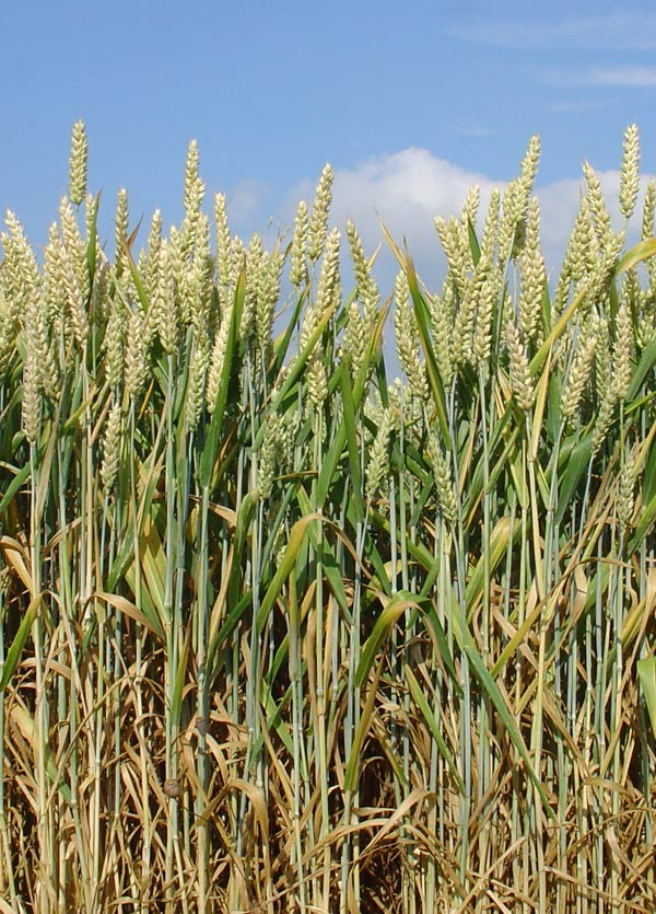 Weizen. Photographiert Anfang Juli 2005 in Südbelgien bei Thulin.